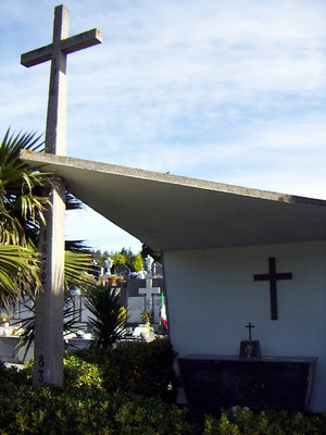 Baleares gurutze-ontzian 1938an hildako errekete ondarroarren omenezko mausoleoa Ondarroako hilerrian, 2006 urtean.